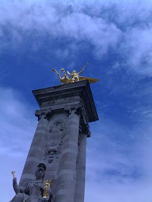 Pont Alexandre III - detail-Paris